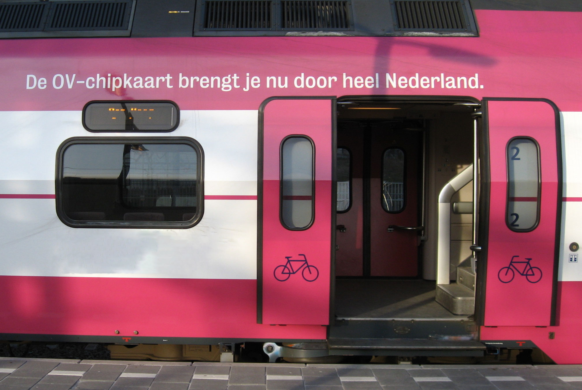 IRM in totaalreclame OV-chipkaart ivm publiciteitscampagne van de NS